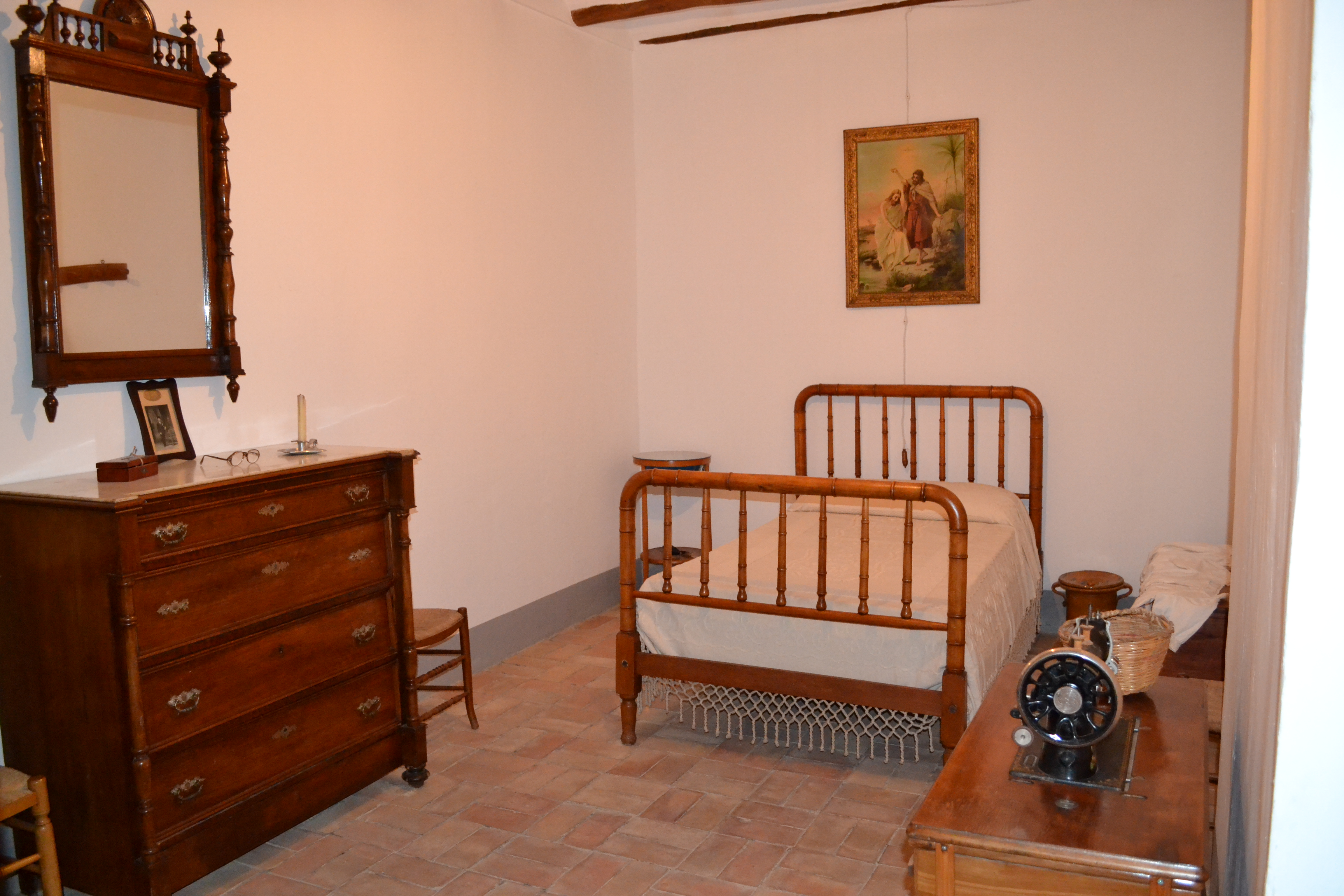 Habitación típica del S.XVII-XX